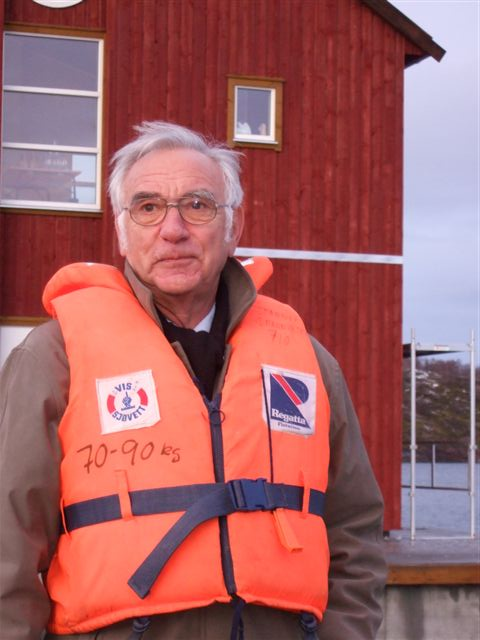 Tidligere fiskeriminister Bjarne Mørk-Eidem på besøk hos Torgar Næringshage i 2008